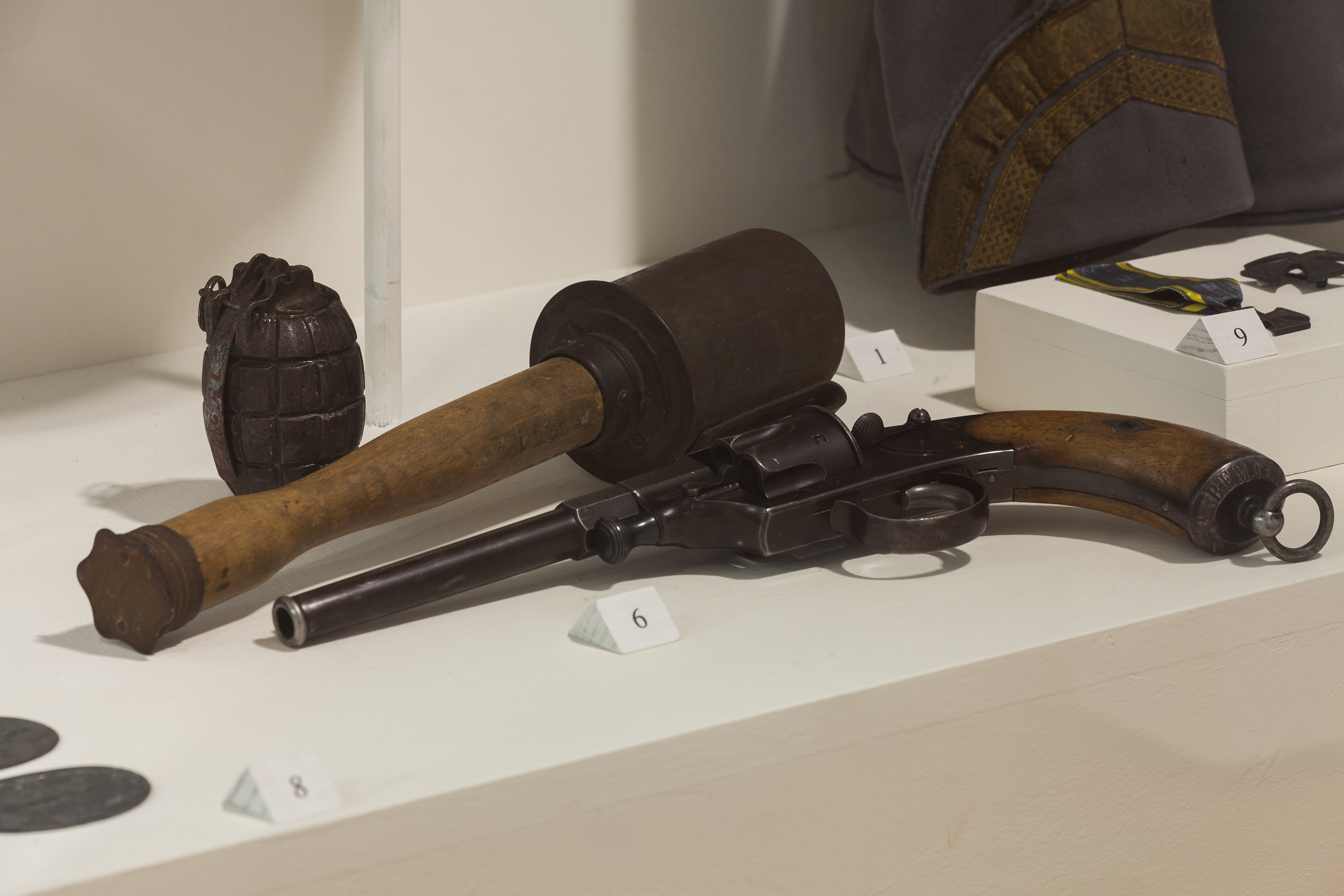 Ausrüstung im Weltkrieg. 6.) M1879 Reichsrevolver 7.) Stielhandgranate M1916 und Mills Granate No. 5 8.) Erkennungsmarken braunschweigischer Soldaten 9.) Braunschweigisches Militär-Verdienstkreuz von 1914